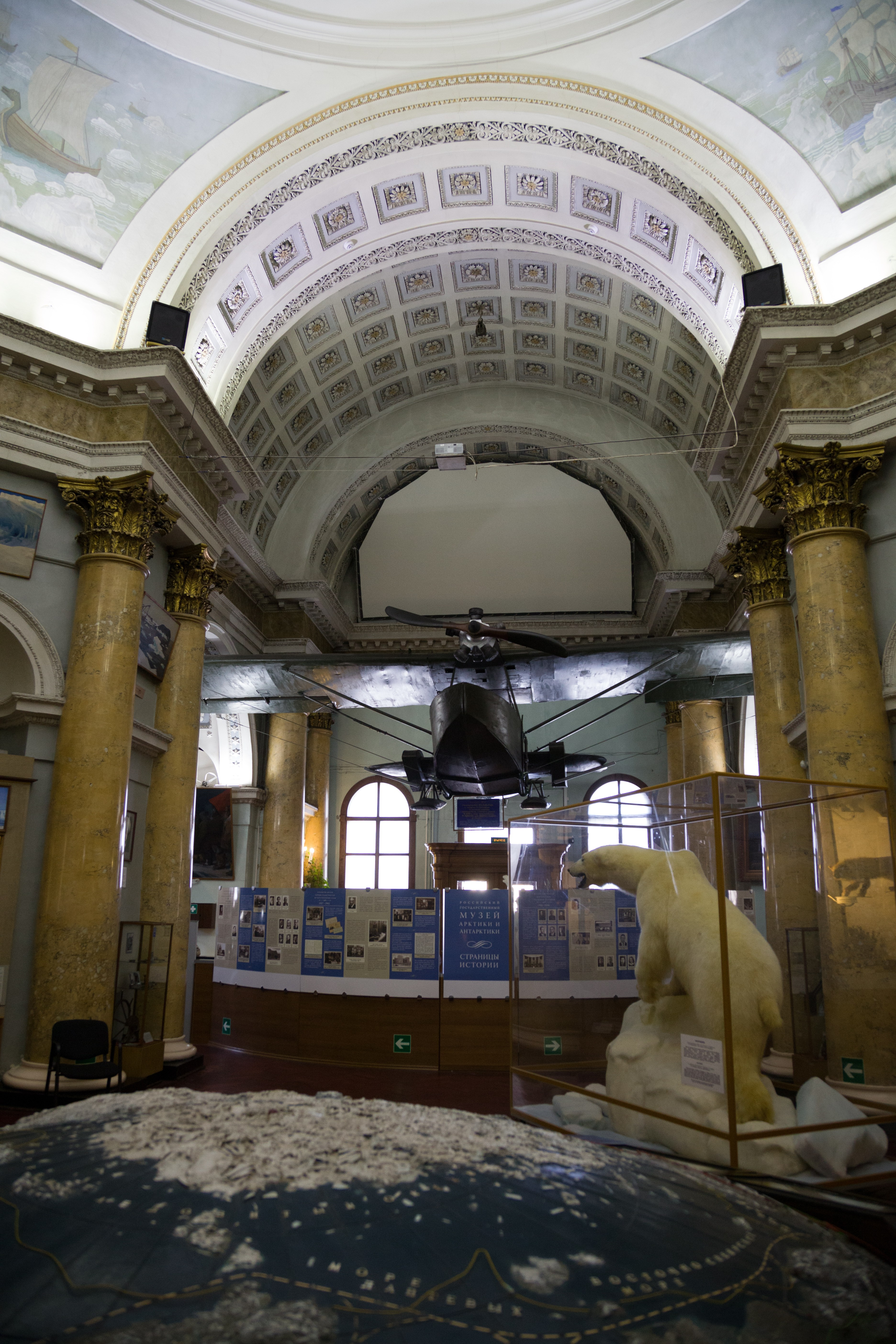 Интерьер музея Арктики и Антарктики